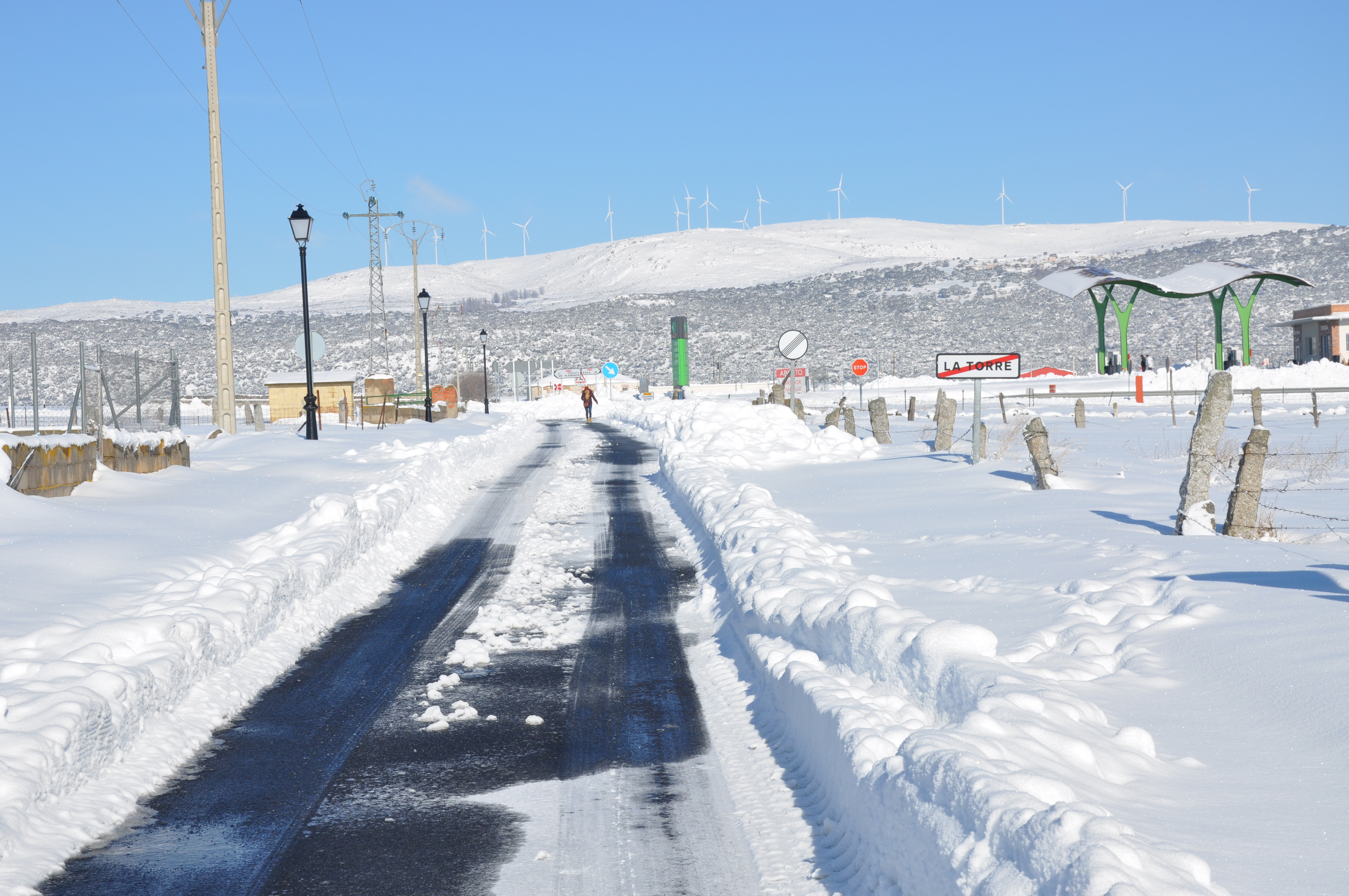 Cerro de Gorría desde La Torre, AV, España